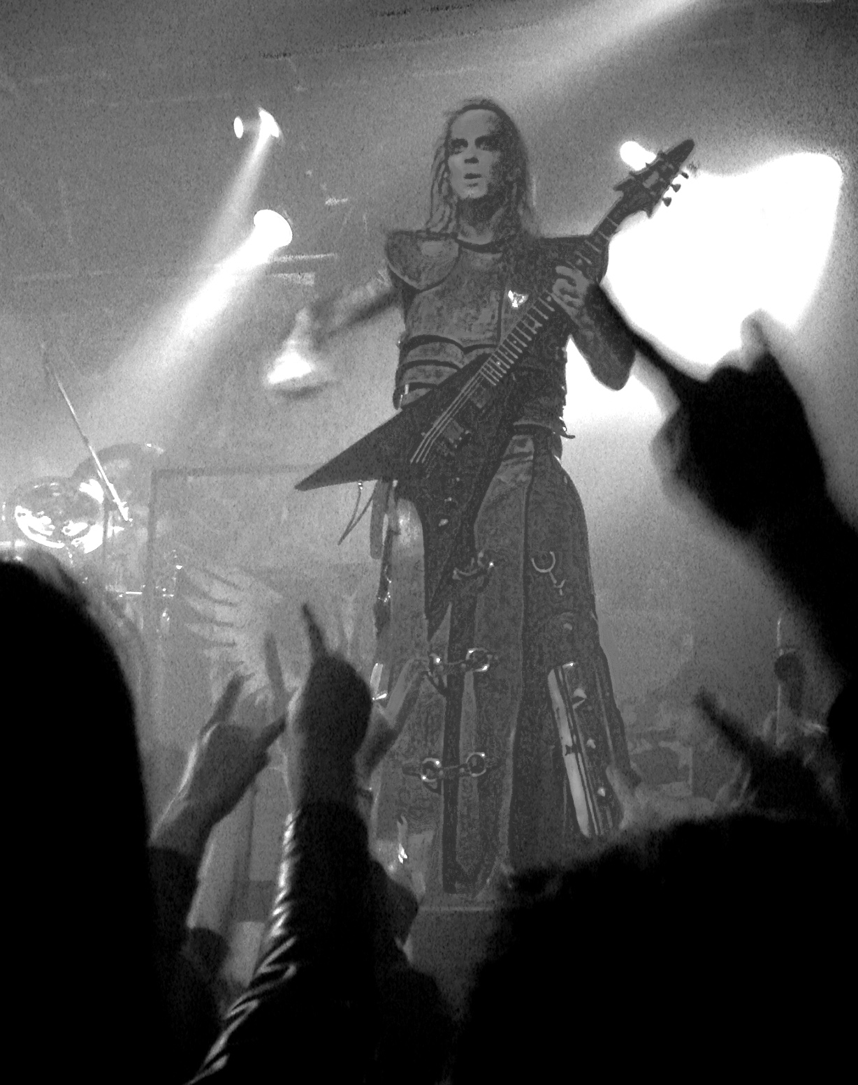 Behemoth en concert à La Locomotive, à Paris, le 17/02/2008: Nergal.